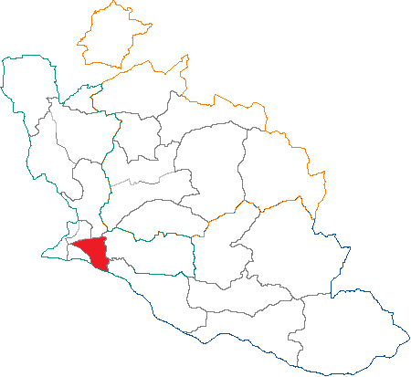 situation du canton d'Avignon Est dans le département de Vaucluse (France)